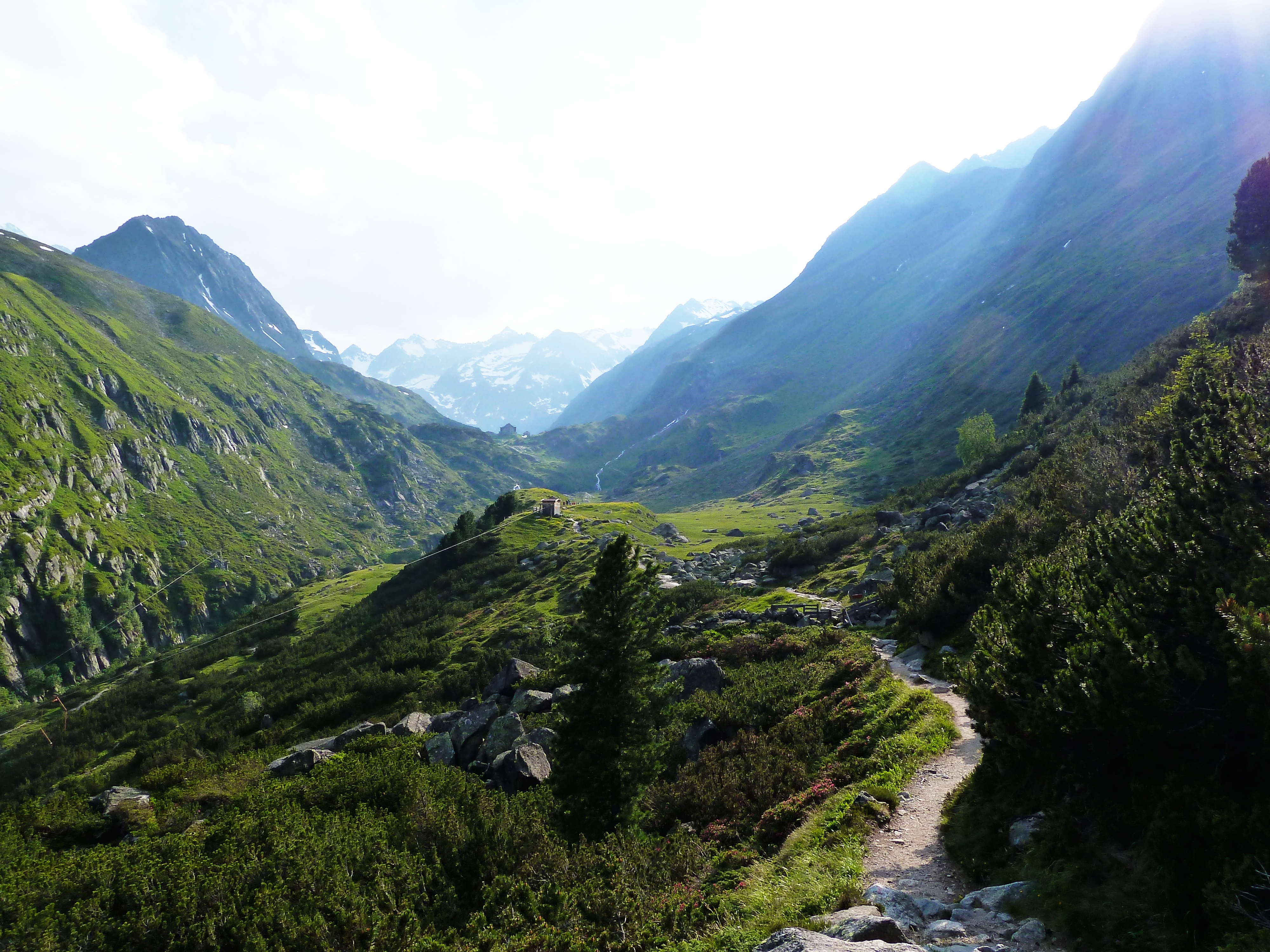 Franz-Senn-Hütte im Sommer